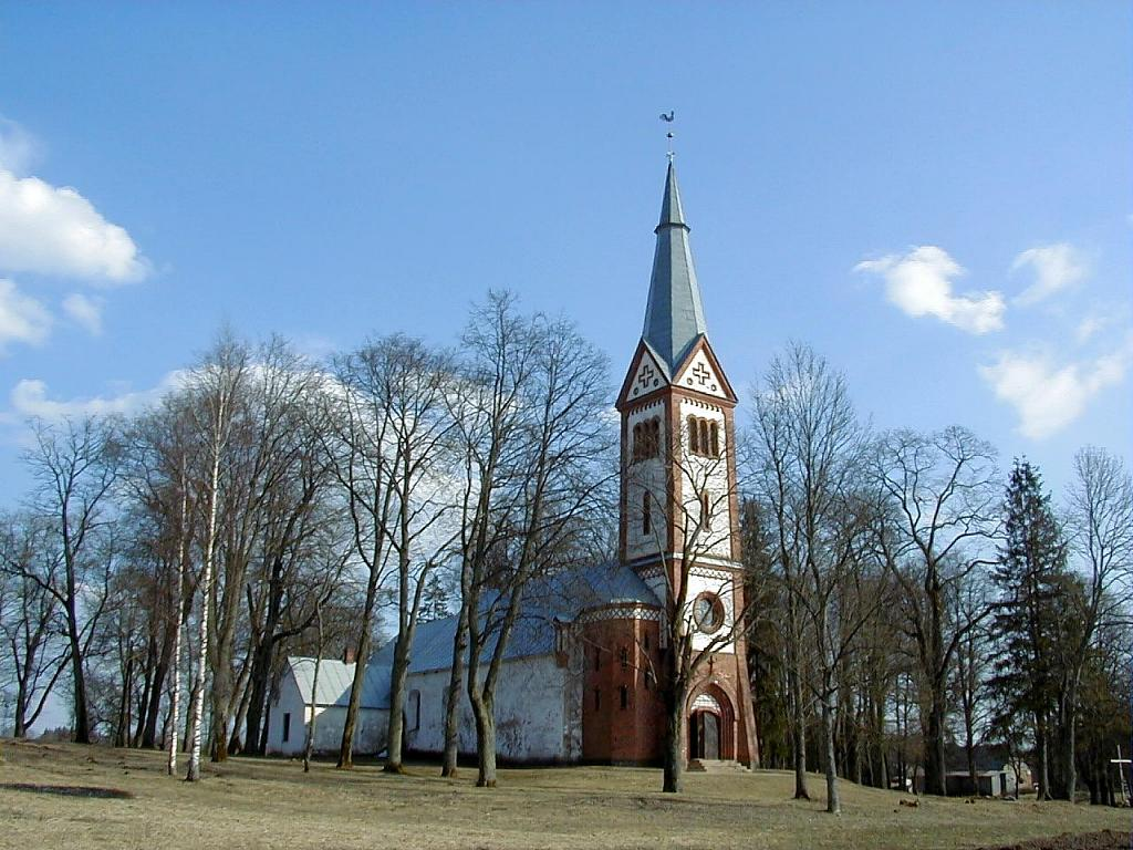 Krimuldas baznīca 2001-04-07